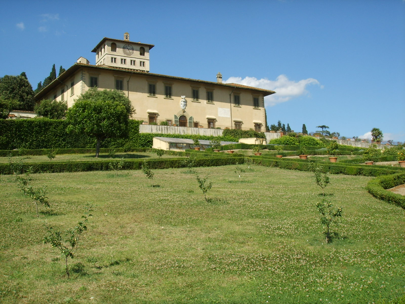 Villa La Petraia, Florence, Italy